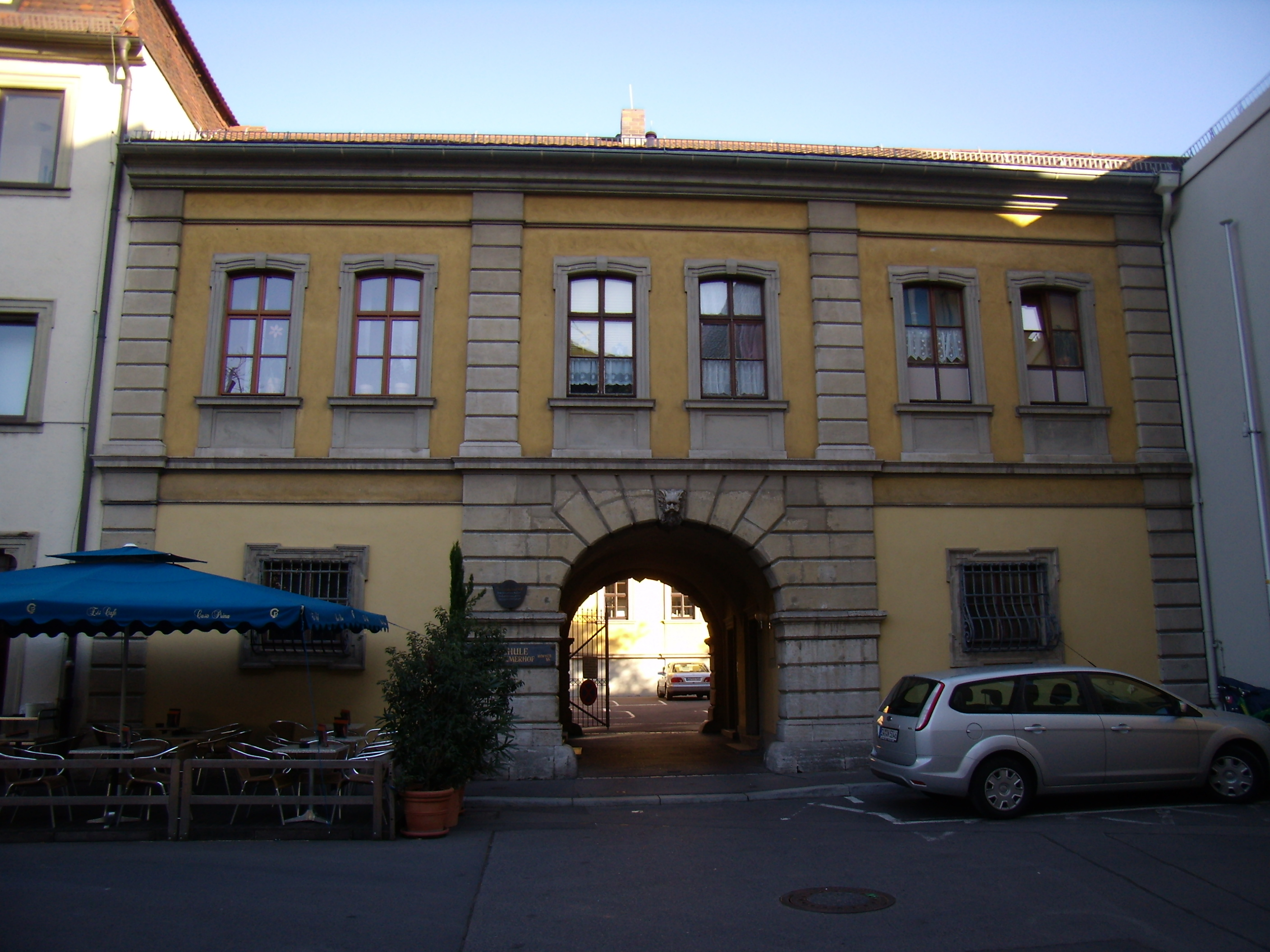 Würzburg - Hofstraße 16 Bechtolsheimer Hof; charakteristisch die gebossten Quader